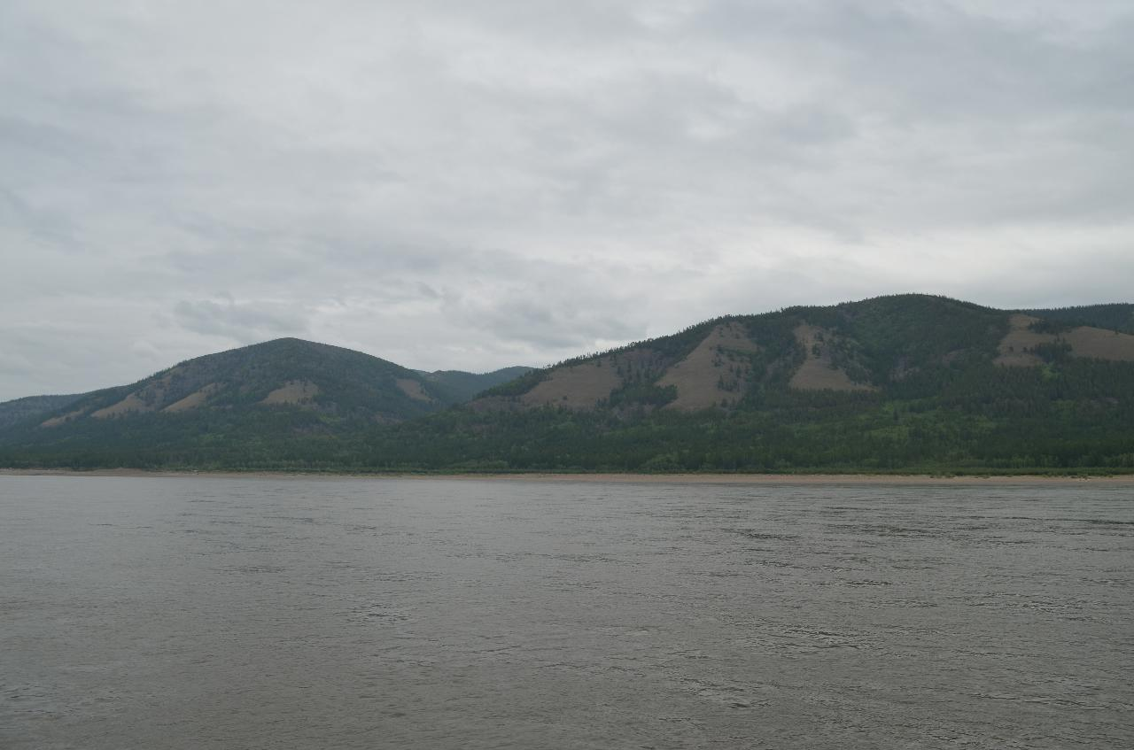 Усть-Вилюйский хребет, Кобяйский район, Якутия